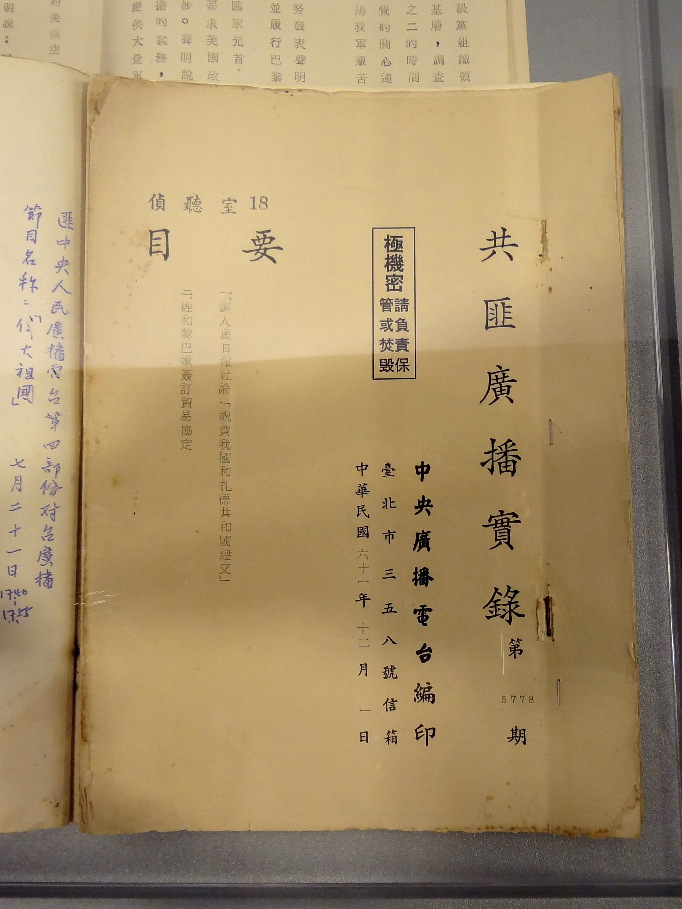 中文（台灣）: 松山文化創意園區「金鐘五十．響 特別展」展示品：1972年（中華民國61年）12月1日中央廣播電台編印《共匪廣播實錄》第5778期。